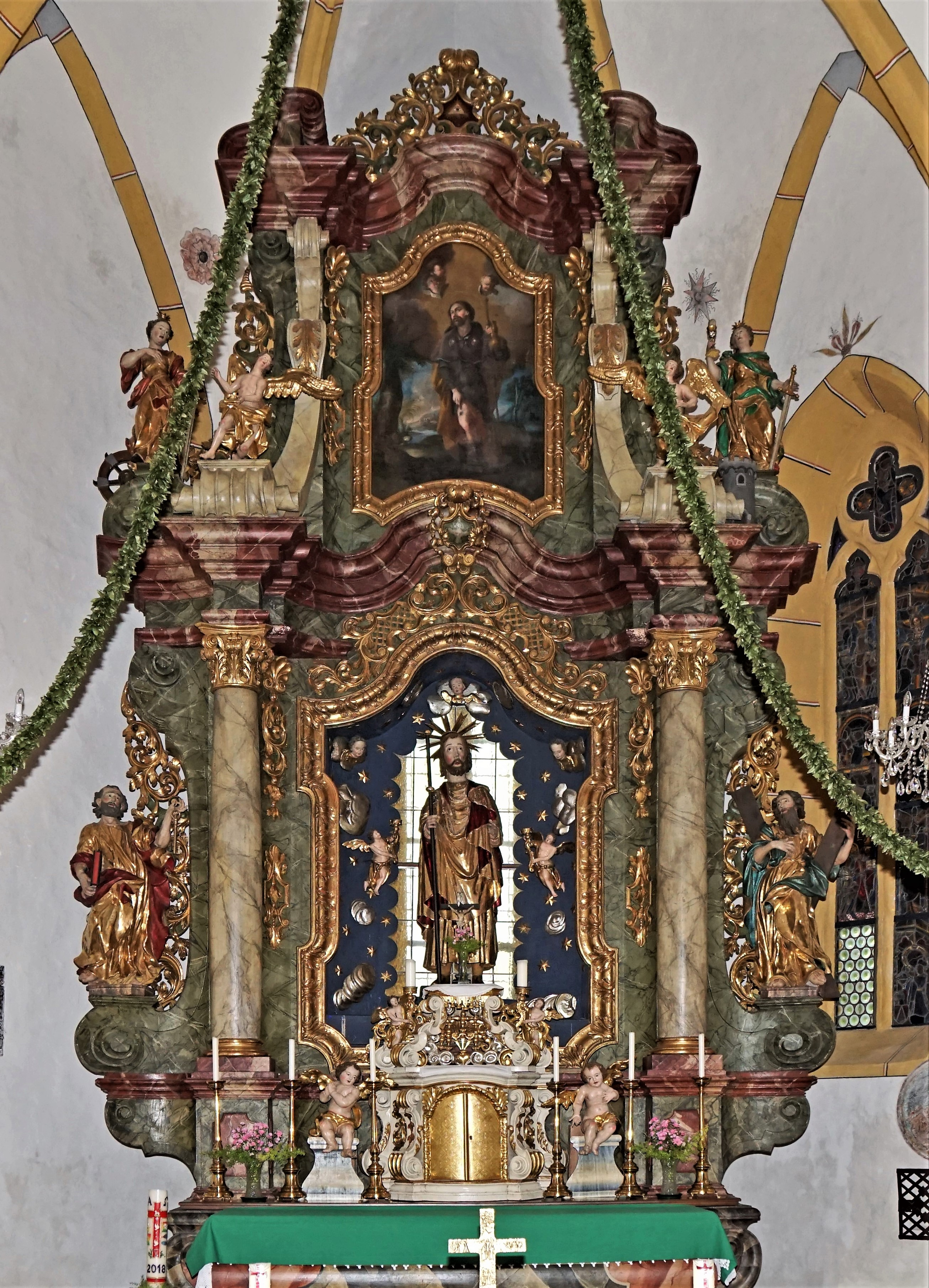 Kath. Pfarrkirche Hl. Jakobus d. Ä., Neuhaus (Kärnten), barocker Hochaltar mit spätgotischer zentraler Figur des hl. Jakobus des Älteren